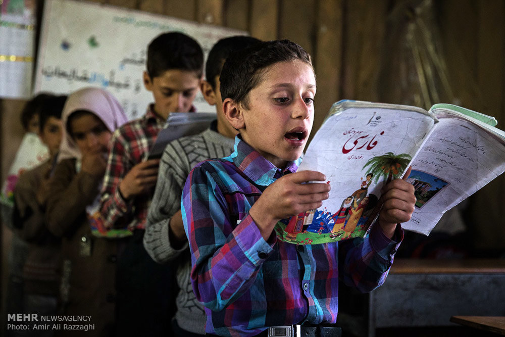 دبستان امام حسن المجتبی(ع) در منطقه صعب العبور روستای محروم اسبو استان مازندران از نداشتن آب آشامیدنی ، وسایل گرمایش برای فصل سرما ، سرویس بهداشتی ، تلفن ، گاز و همچنین جاده بسیار ناهموار رنج میبرد.